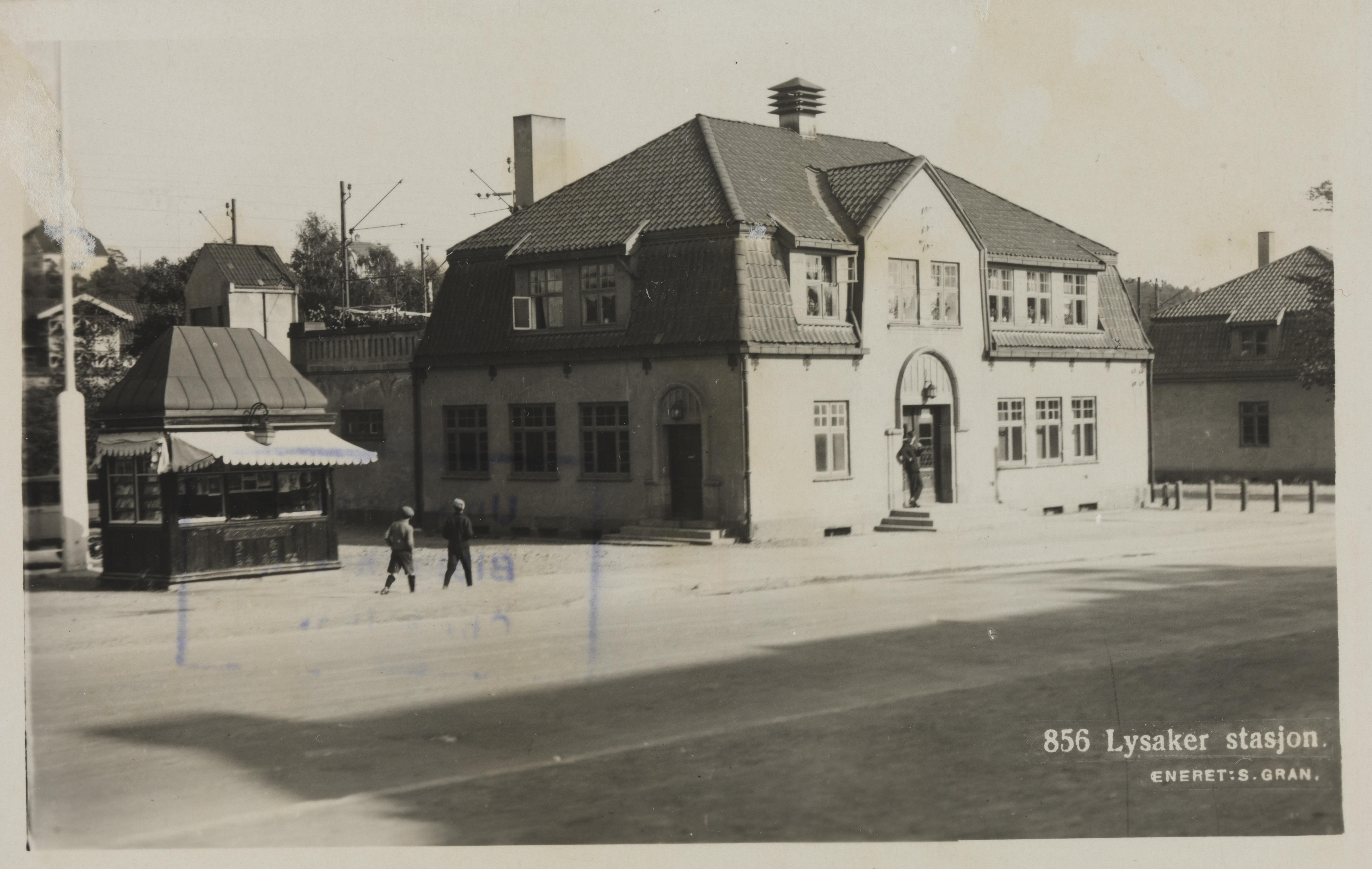 Bildet er hentet fra Nasjonalbibliotekets bildesamling Bærum,Lysaker,Lysaker stasjon, Bærum, Akershus